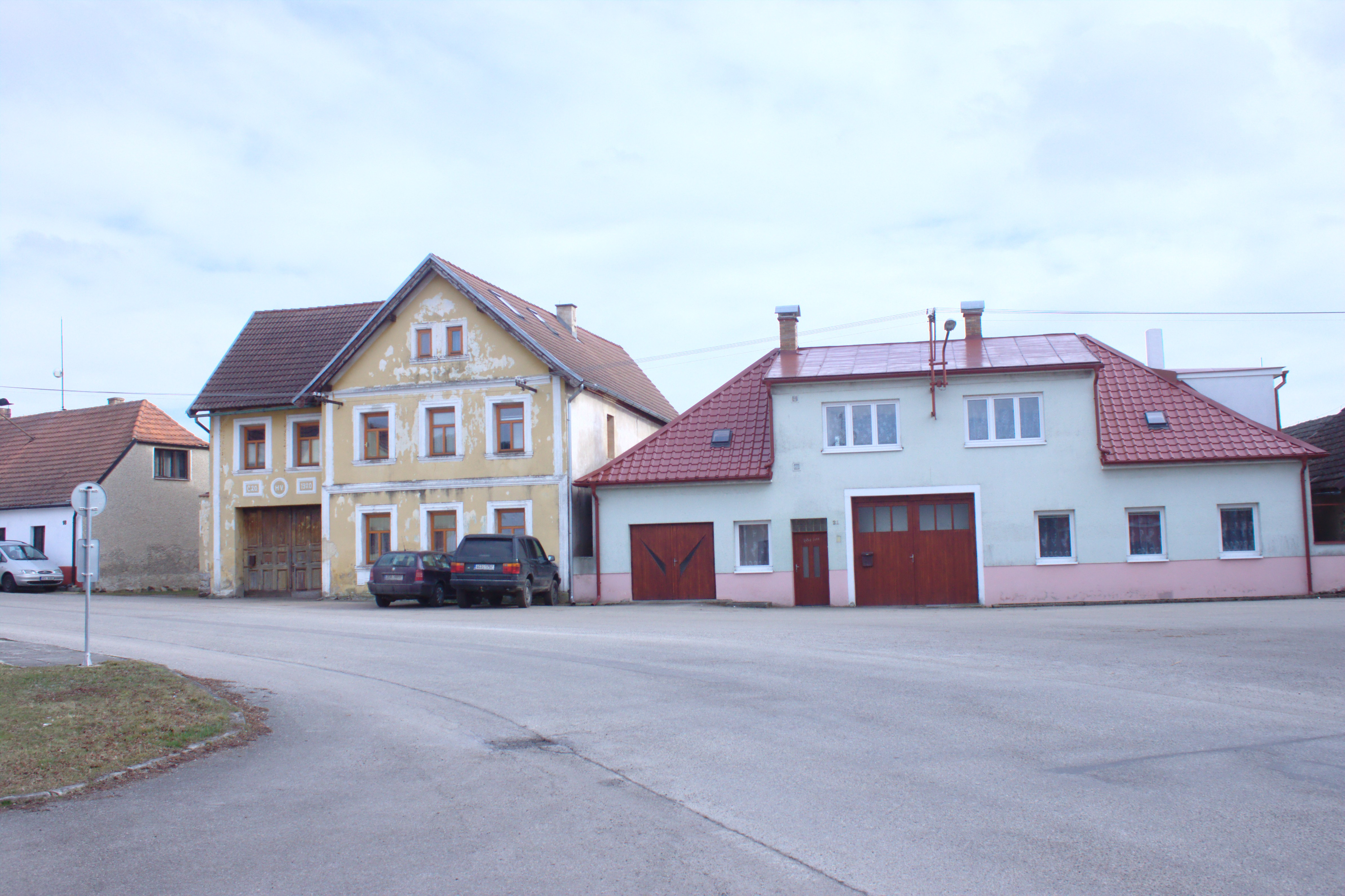 Domy na návsi ve vesnici Chmelná Project: Fotíme Česko